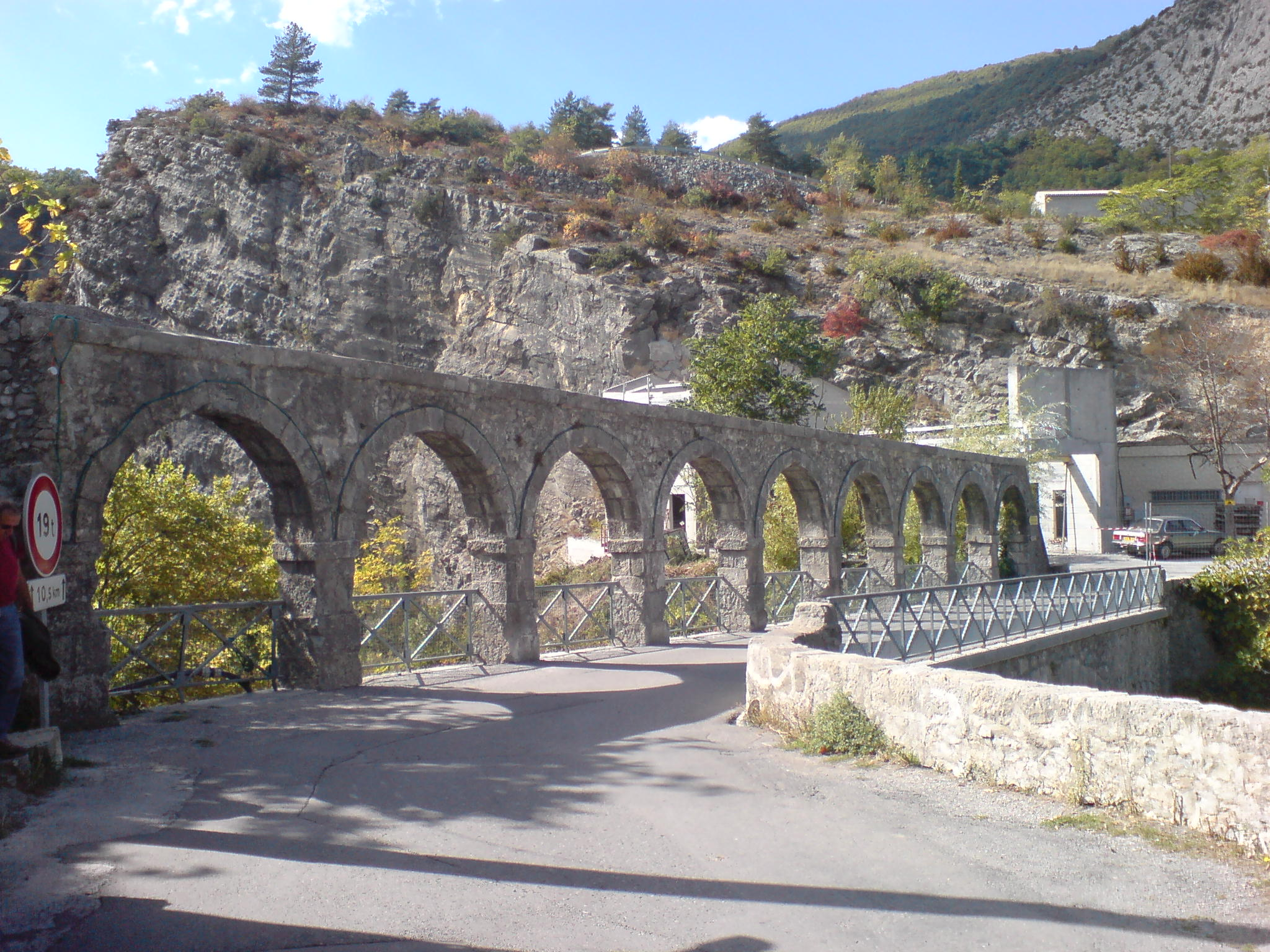 petit aqueduc à Entrevaux